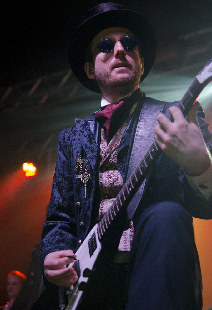 A Banda de Metal Sinfônico Therion apresenta-se em São Paulo, Brasil.